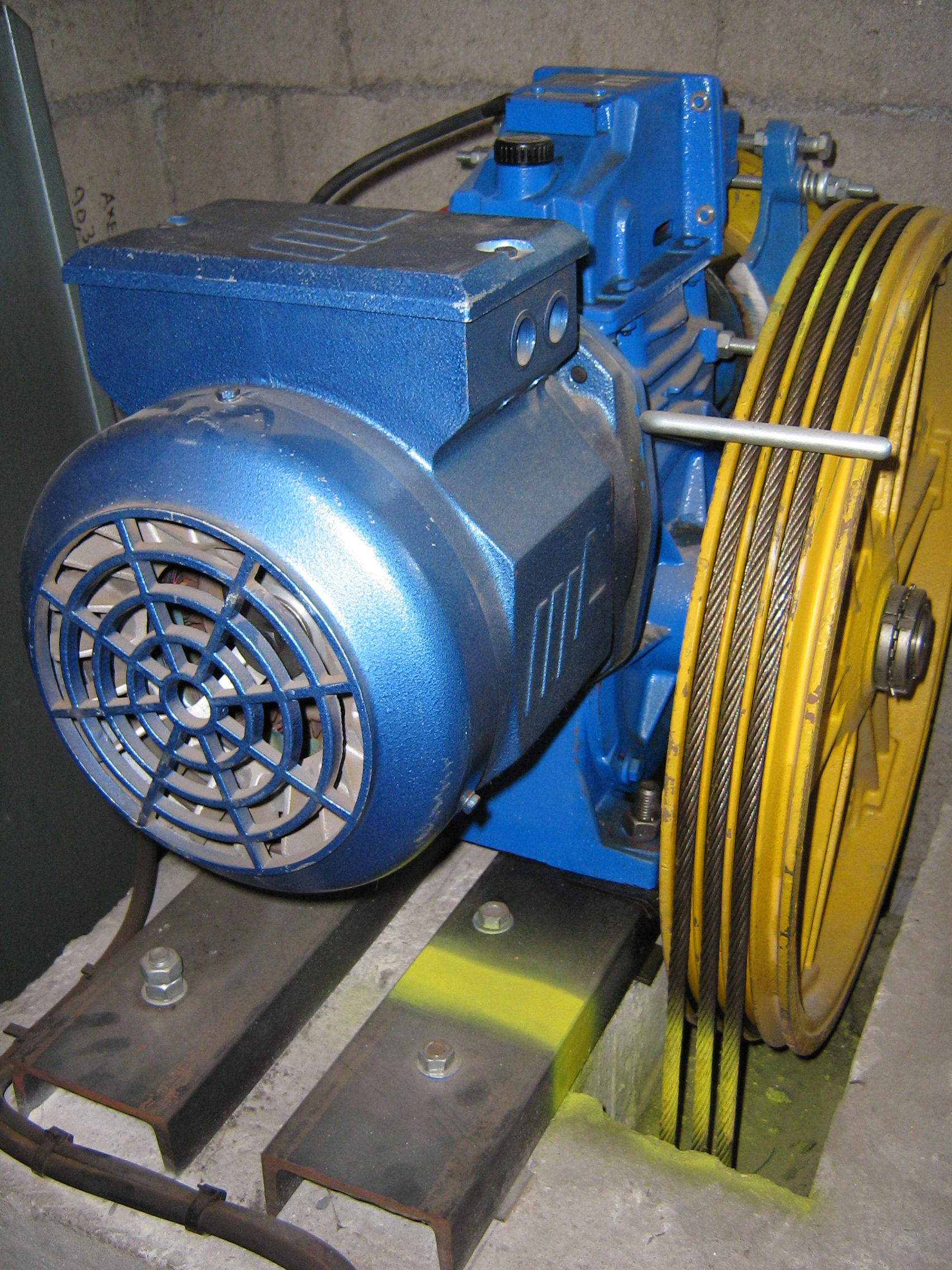 Groupe moto-réducteur ascenseur